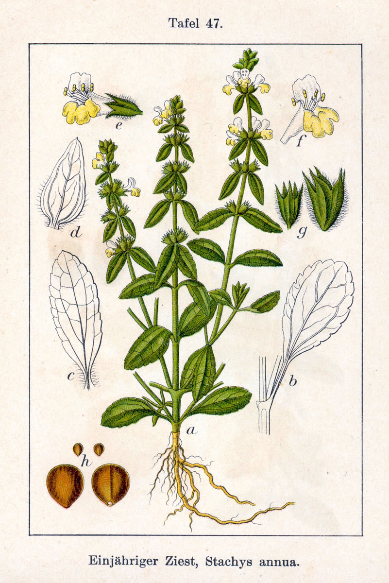 Stachys annua (L.) L. Original Description Einjähriger Ziest, Stachys annua